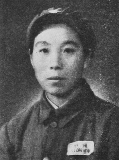 中國人民政治協商會議第一屆全體會議代表